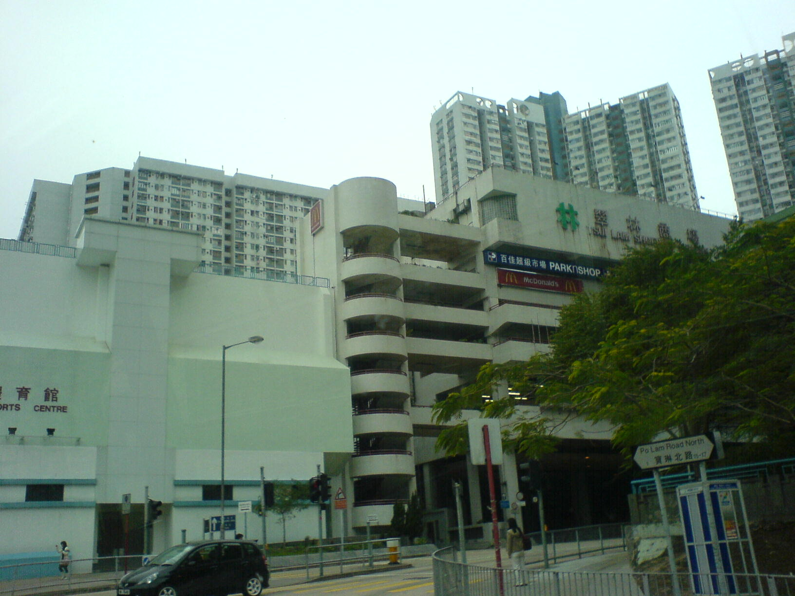 Tsui Lam Estate